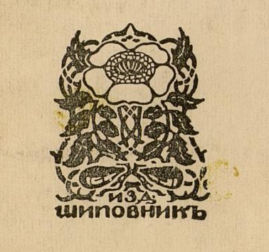 Логотив изд-ва "Шиповник", работавшего в Петербурге с 1906 по 1923 год. Автор рисунка - Евгений Лансере, 1906.